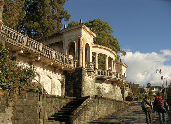 Смотровая площадка в Сухуми